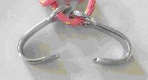 Augenhaken